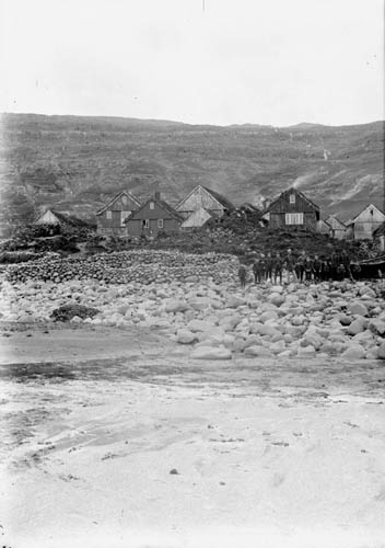 Tjørnuvík, Faroe Islands